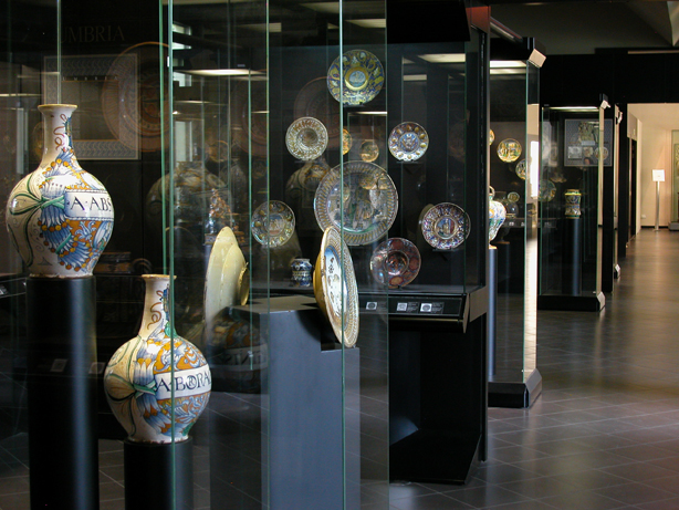 Sala delle maioliche rinascimentali